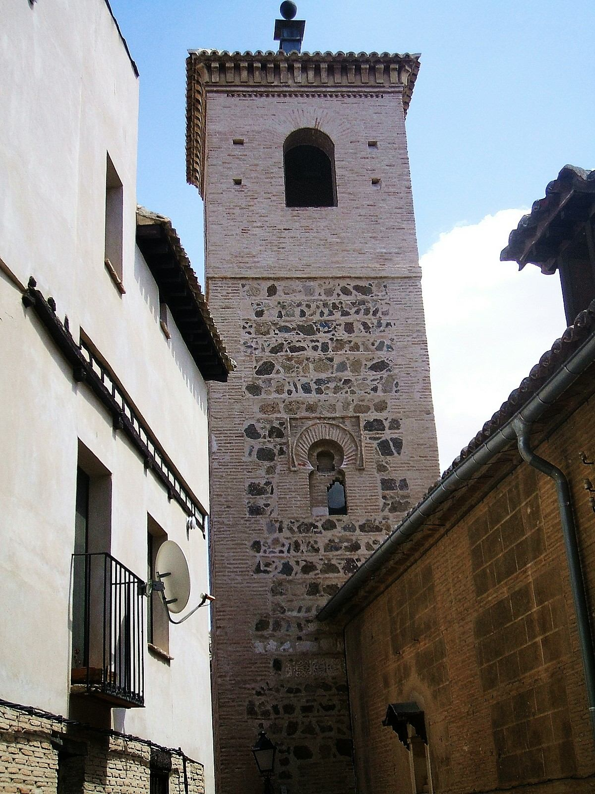 Iglesia de San Bartolomé, Toledo (España)